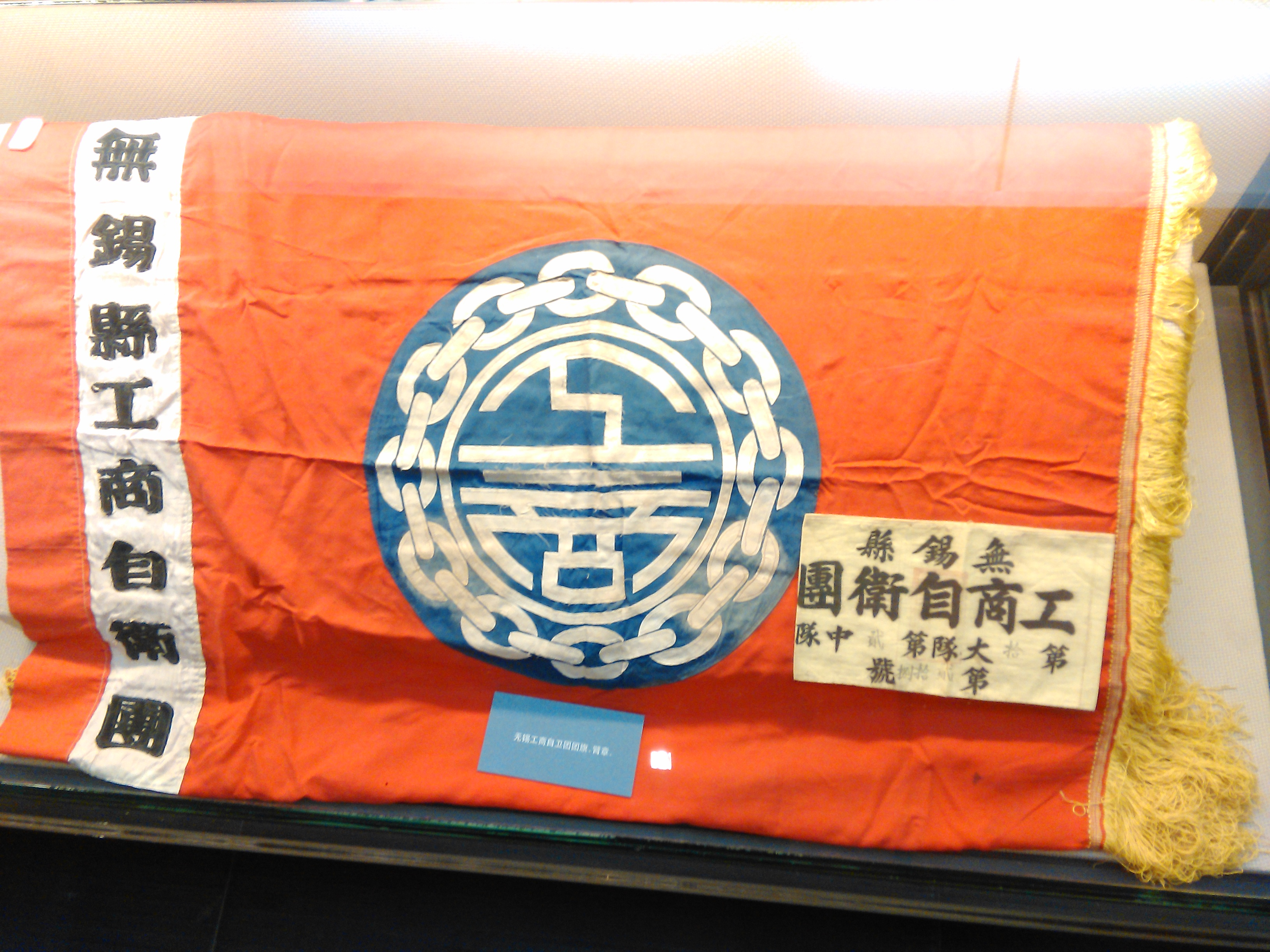 中文（中国大陆）: 无锡工商自卫团团旗、臂章